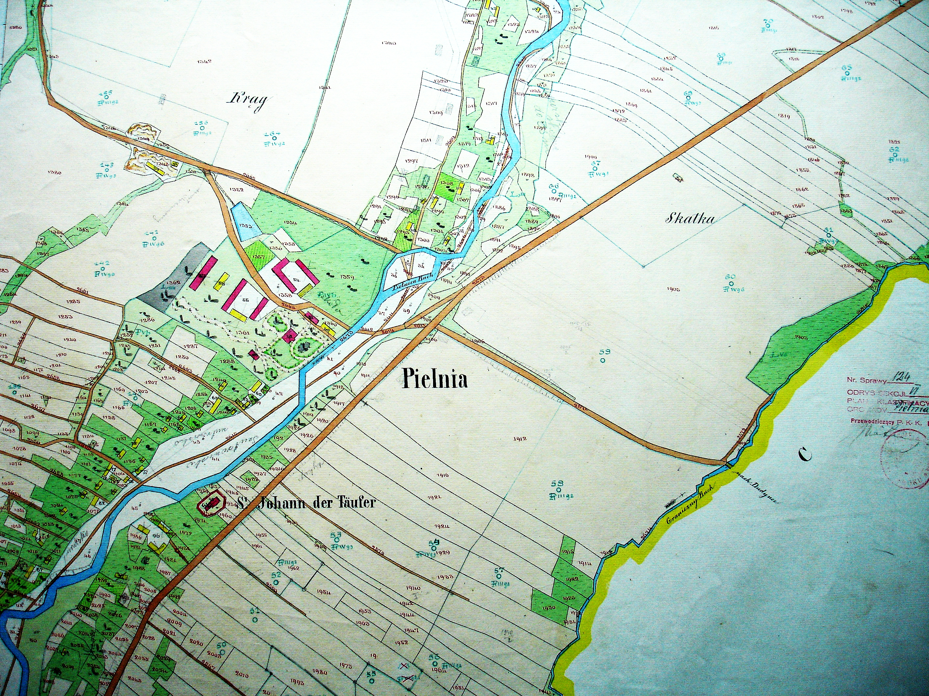 Pielnia, mapa 1852, Marek Silarski